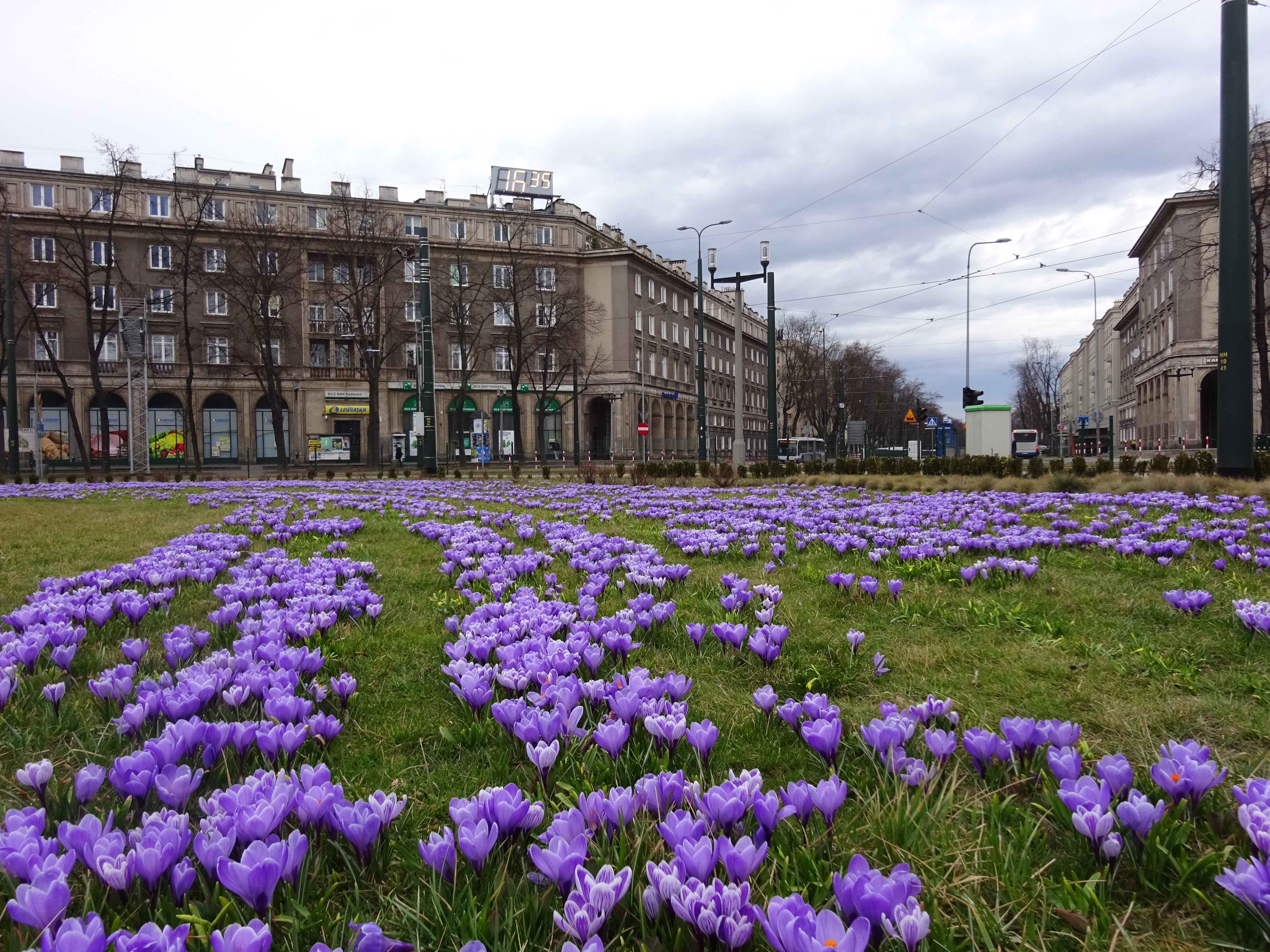 Krokusy wiosenne jako łąka kwietna na Placu Centralnym w Nowej Hucie w Krakowie. 2018